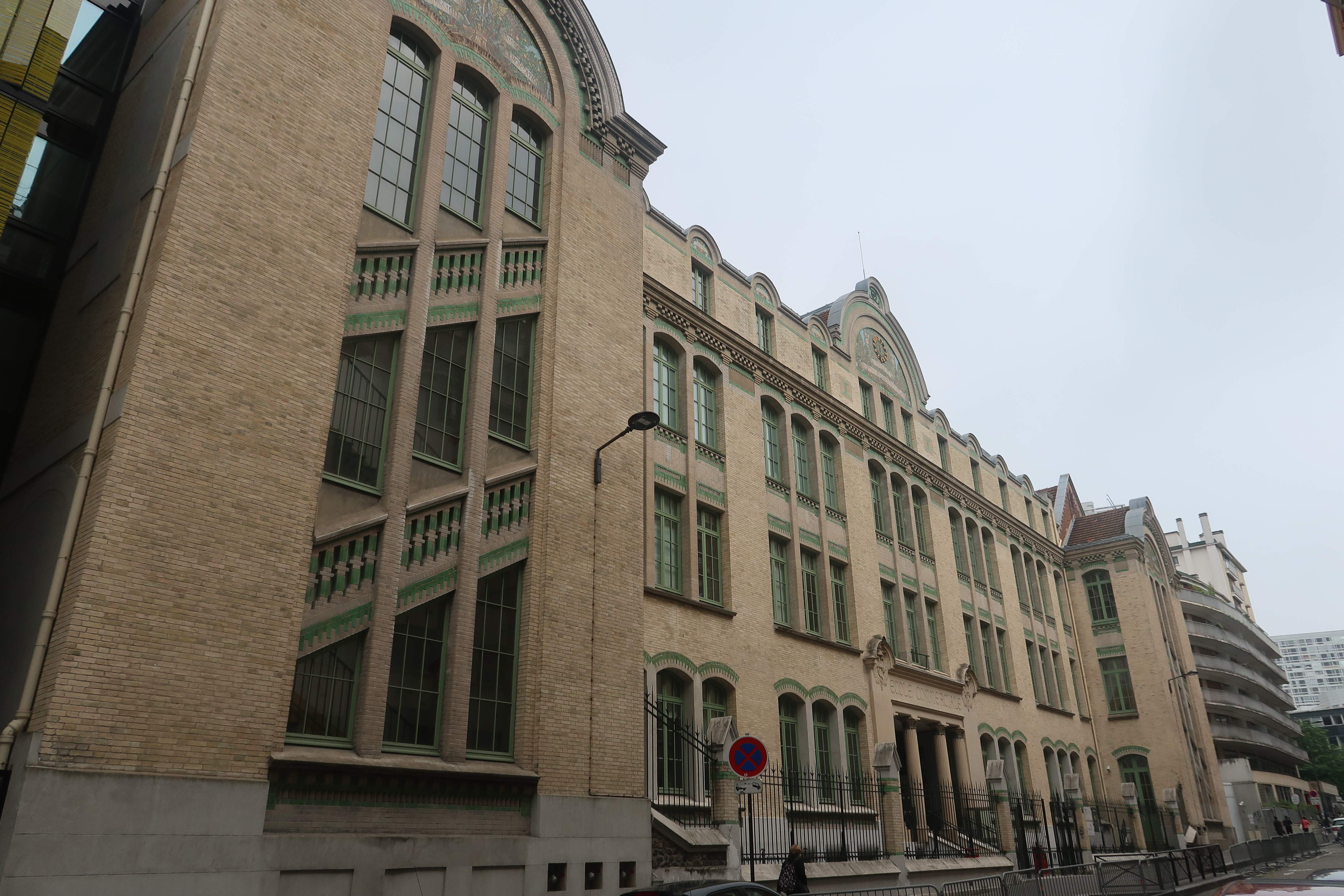 Novancia Business School Paris, 3 rue Armand-Moisant (Paris, 15e).